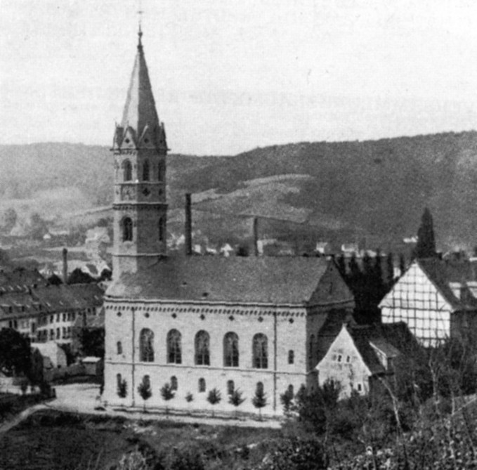 Wuppertal Neue reformierte Kirche, Ansicht von Osten, Photo aus den 1860ern